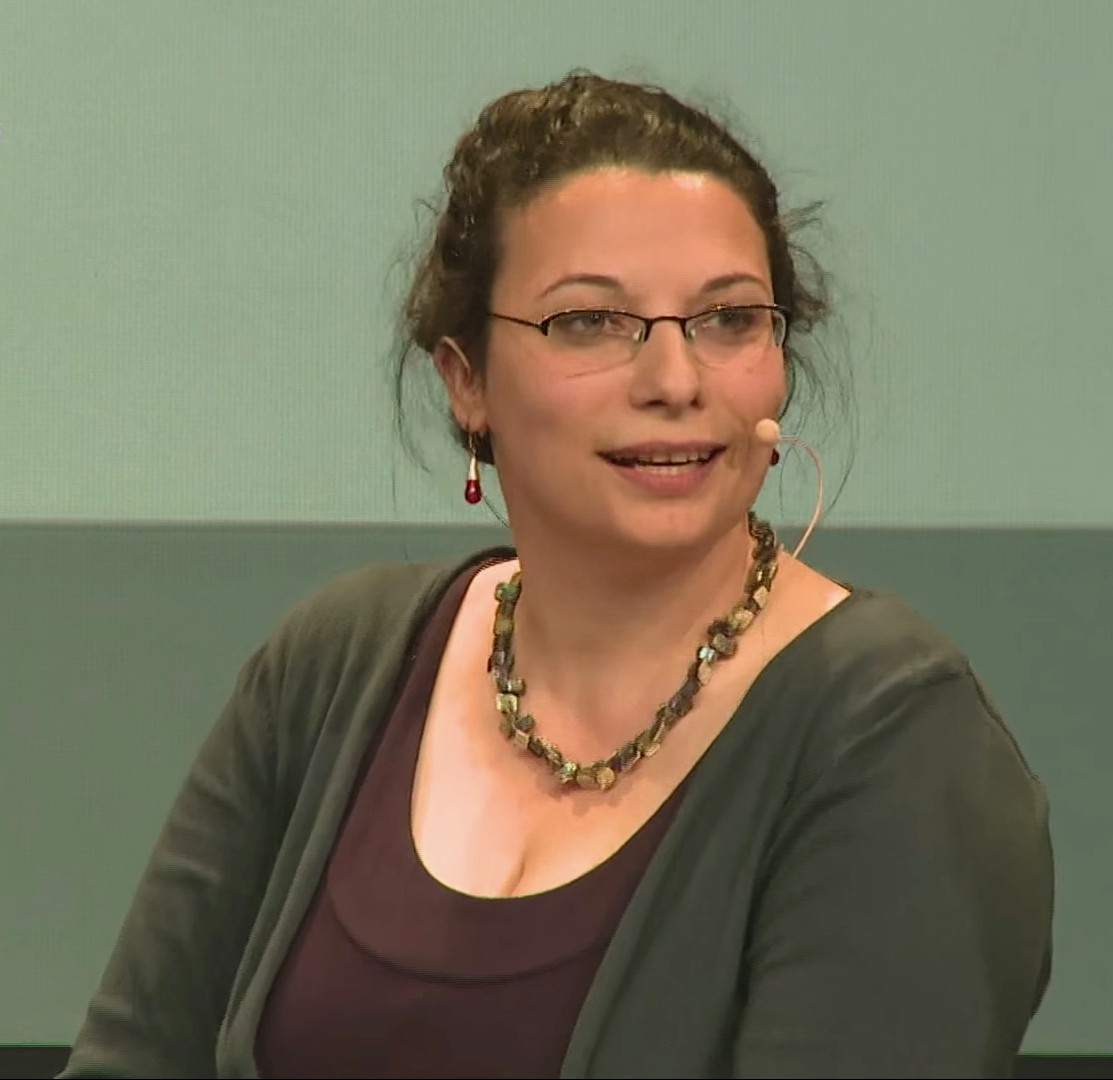 Find out more at: Europa hat offenbar ein Problem. Comedien und Youtube-Star Idil Baydar und die Bloggerin, Juristin und Moscheeführerin Betül Ulusoy sprechen es an. Häufig humorvoll, immer direkt. Dabei machen sie künstliche Trennungen in "wir" und "ihr" sichtbar und konfrontieren ihre Zuschauer und Leser damit. Betül Ulusoy Riem Spielhaus Idil Baydar Creative Commons Attribution-ShareAlike 3.0 Germany (CC BY-SA 3.0 DE)